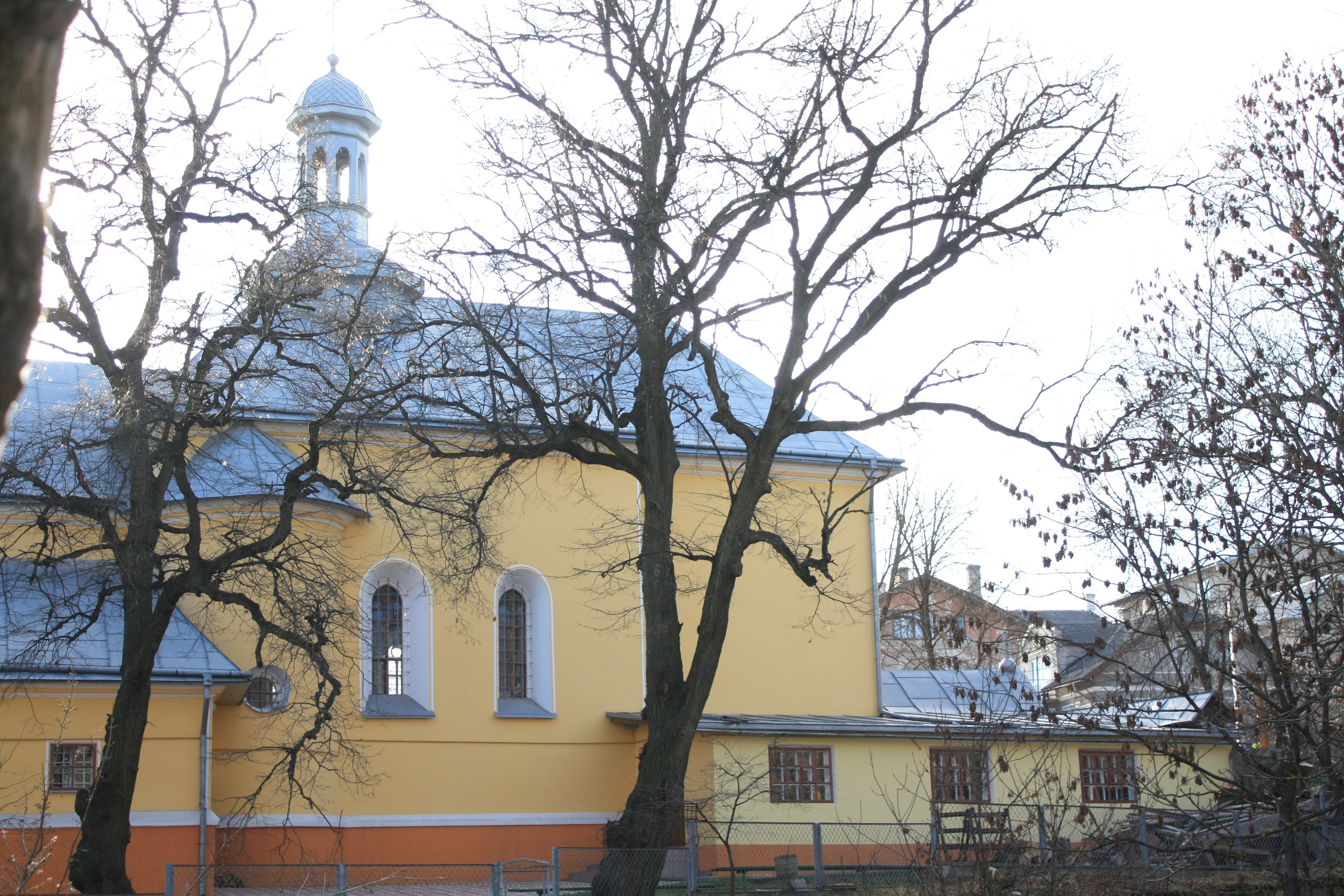 Вигляд з півночі